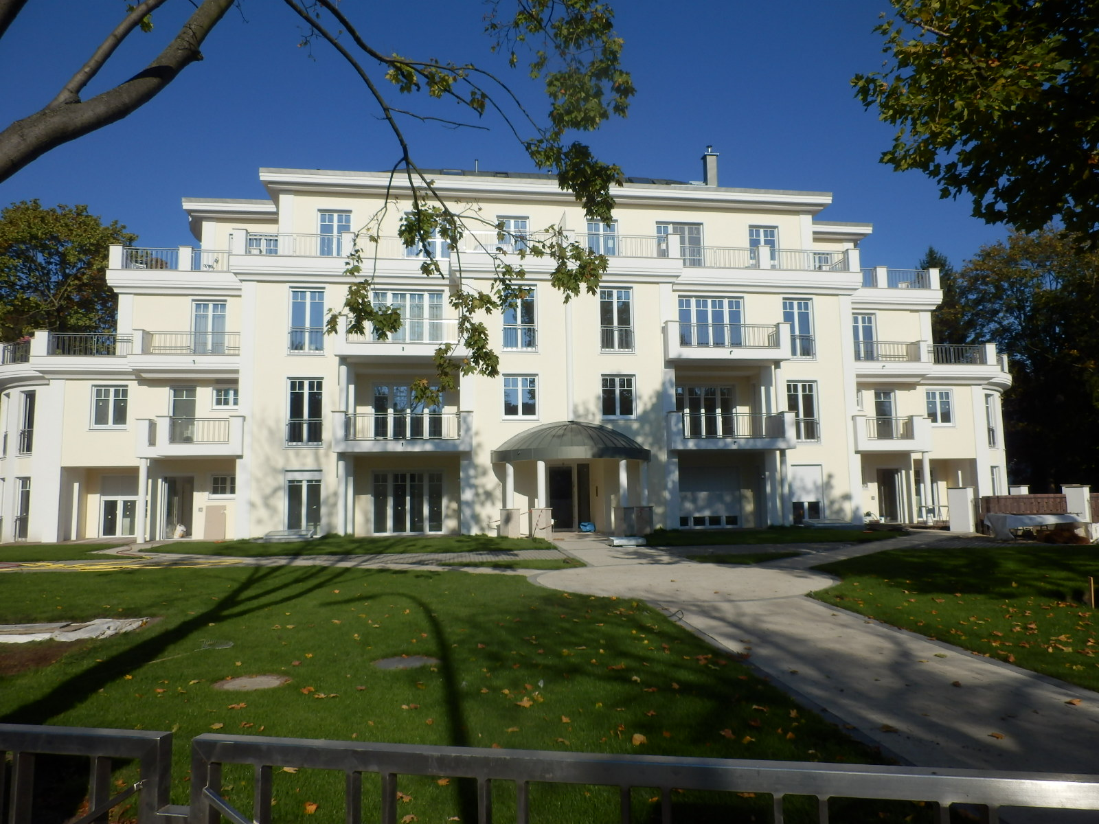 Berlin-Dahlem, Königin-Luise-Straße 13